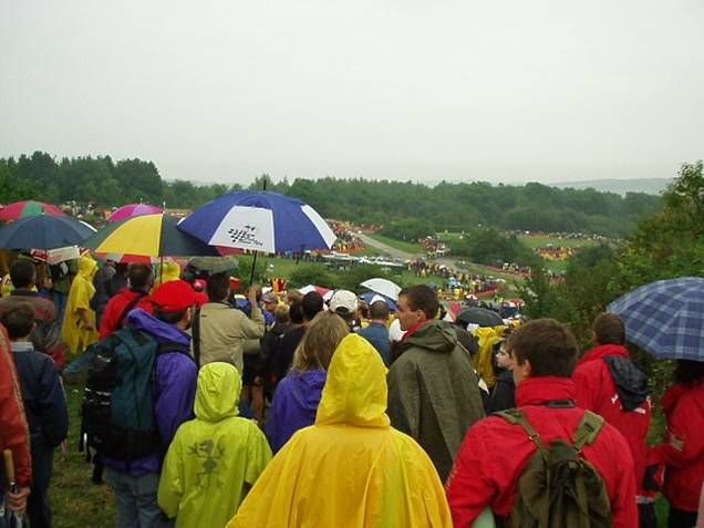 Zuschauer der Rallye Deutschland bei der Wertungsprüfung "Panzerplatte", Baumholder